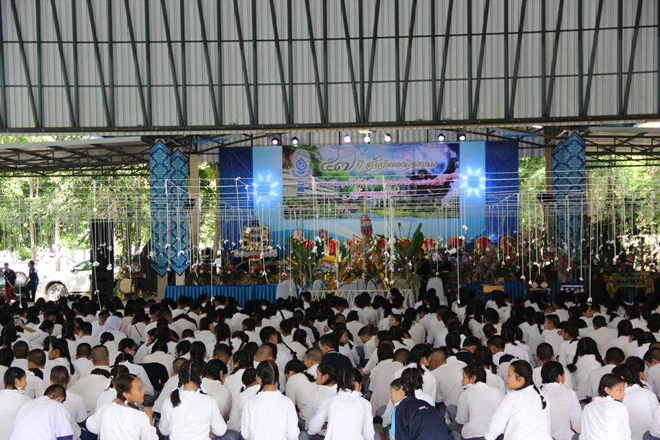 วันสถาปนา ส.ว. 2560